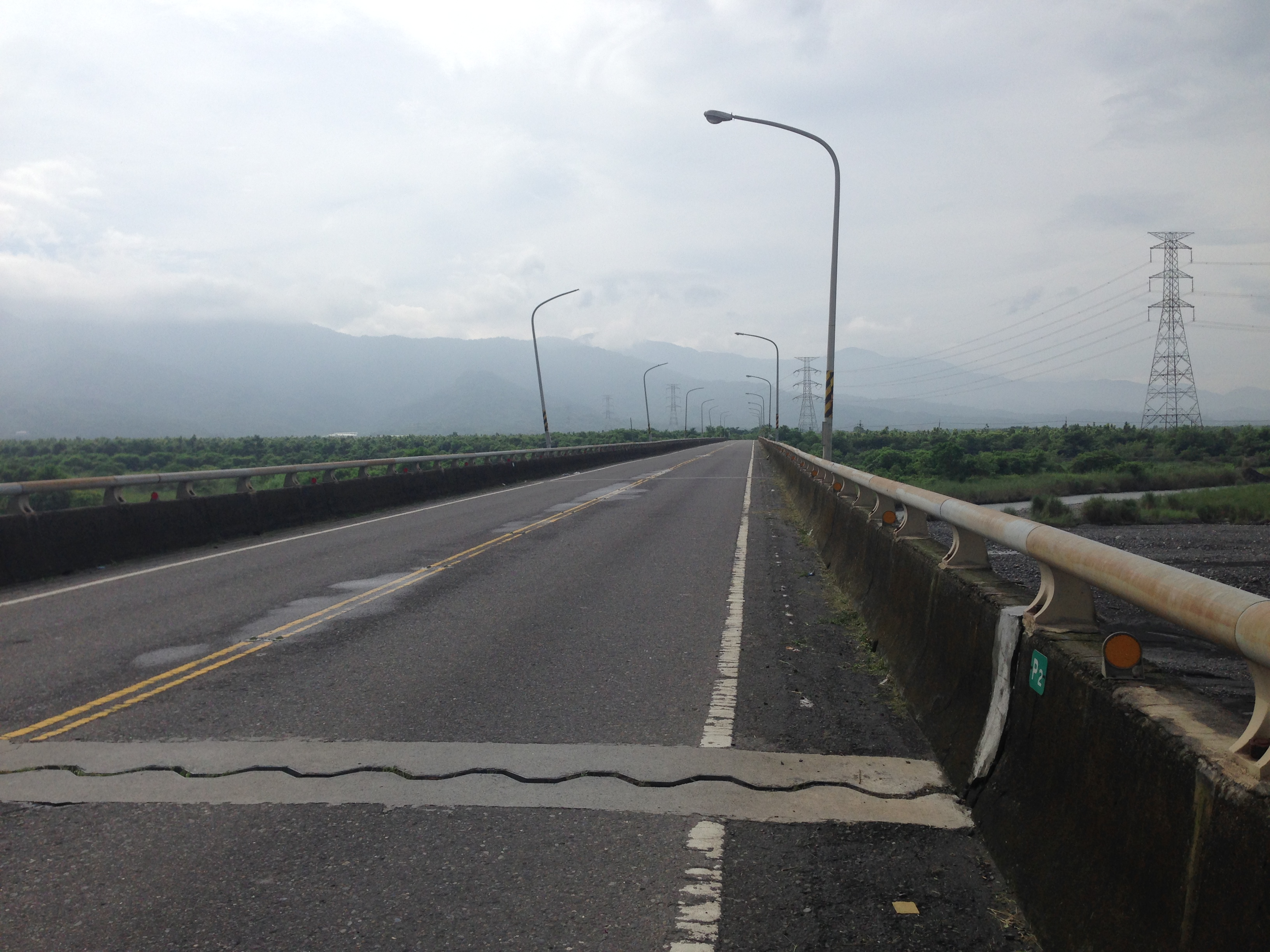 餉潭大橋(185線)